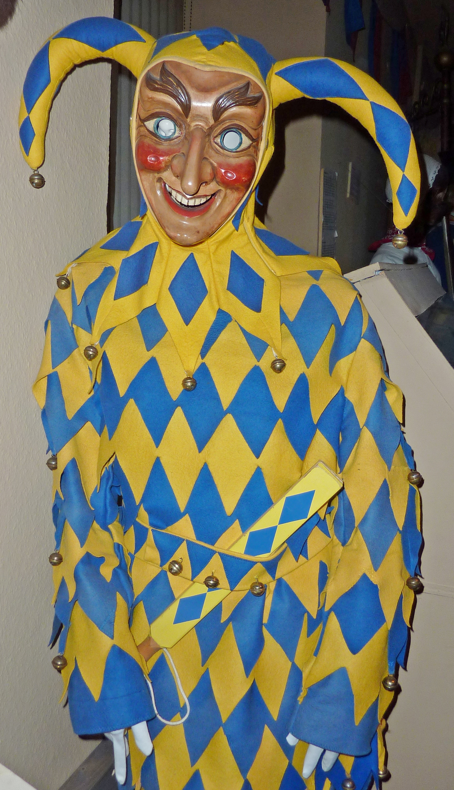 Bajass - Häsfigur der Narrenzunft Krakeelia Waldkirch e.V., hier in der Oberrheinischen Narrenschau Kenzingen ausgestellt